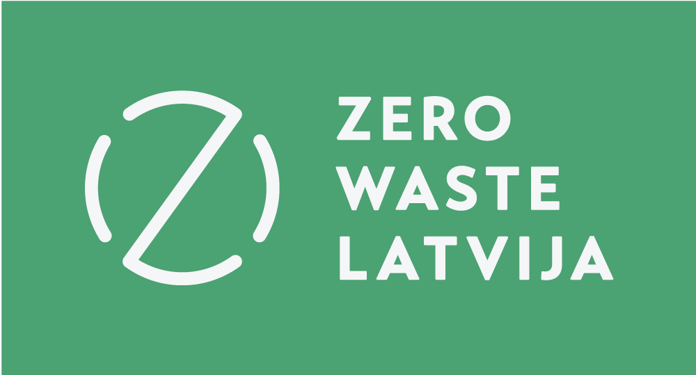 "Zero Waste Latvija" logotips